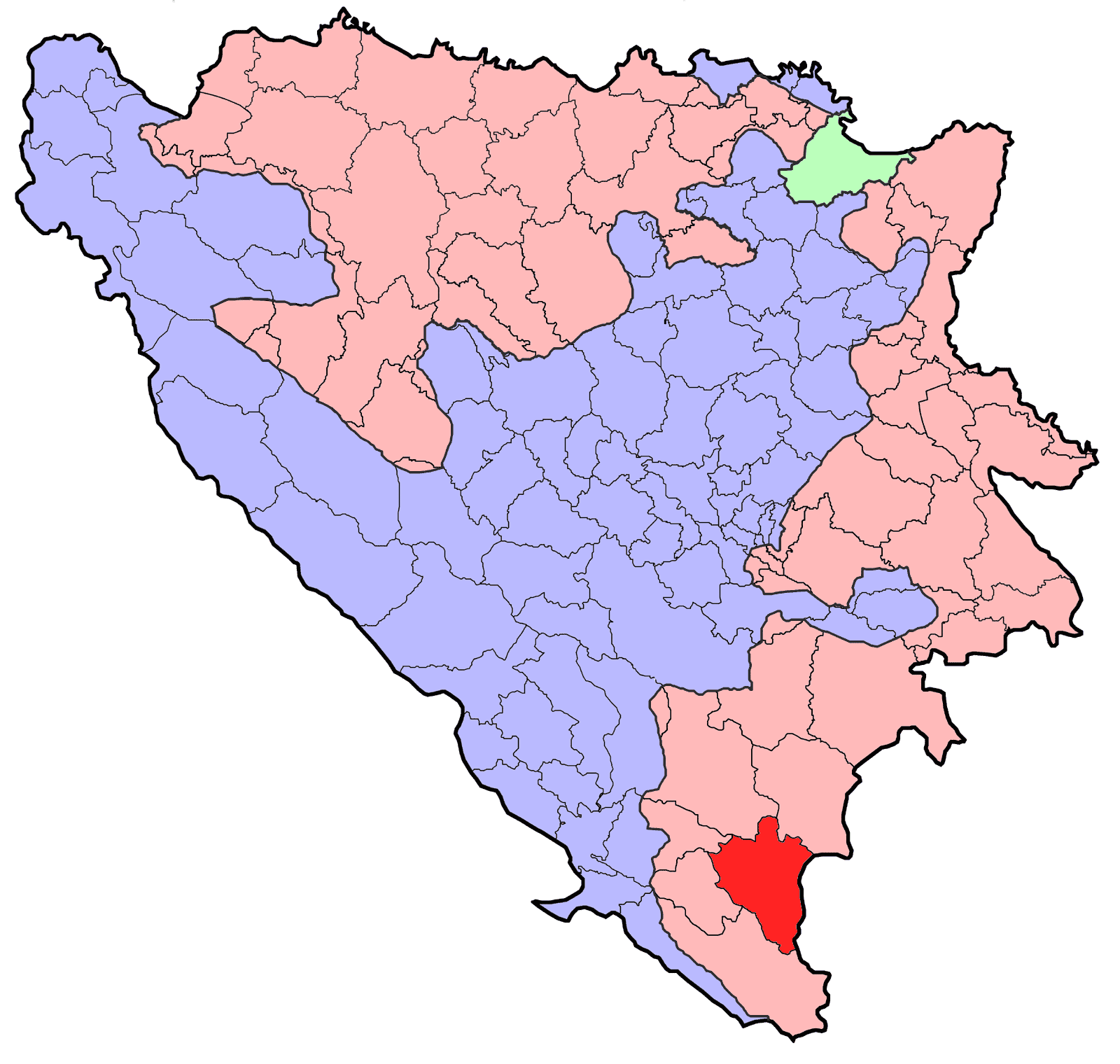 Republika Srpska (BiH) municipality